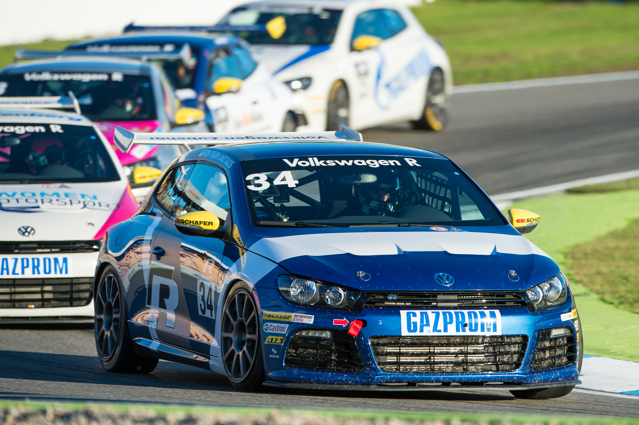 Albert von Thurn und Taxis,DTM,Deutsche Tourenwagen Masters,Hockenheimring,Motorsport,VW Scirocco R-Cup,Volkswagen Scirocco R-Cup